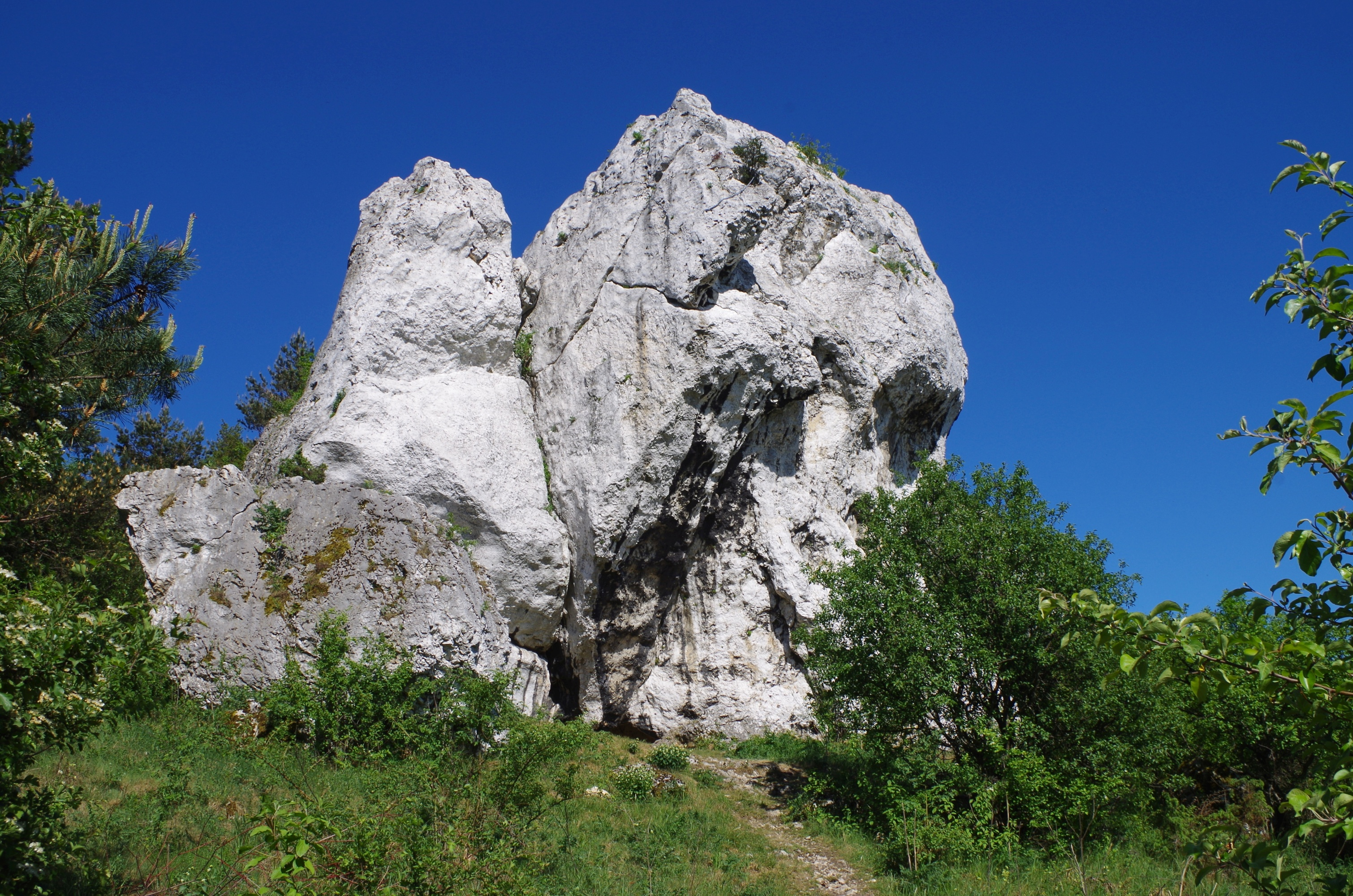 Skały Rzędkowickie. Studnisko